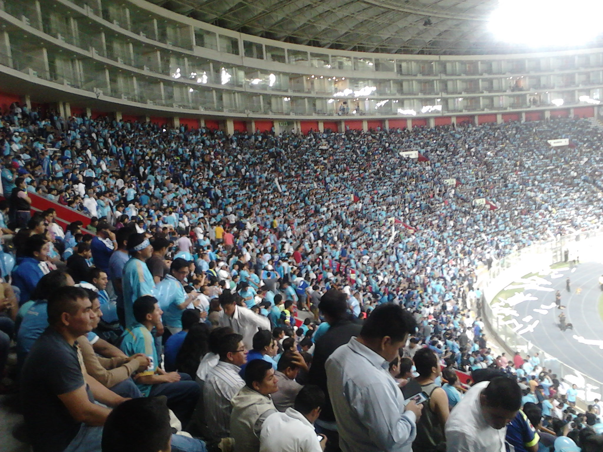 Hinchas del Sporting Cristal en la tribuna sur del Estadio Nacional.